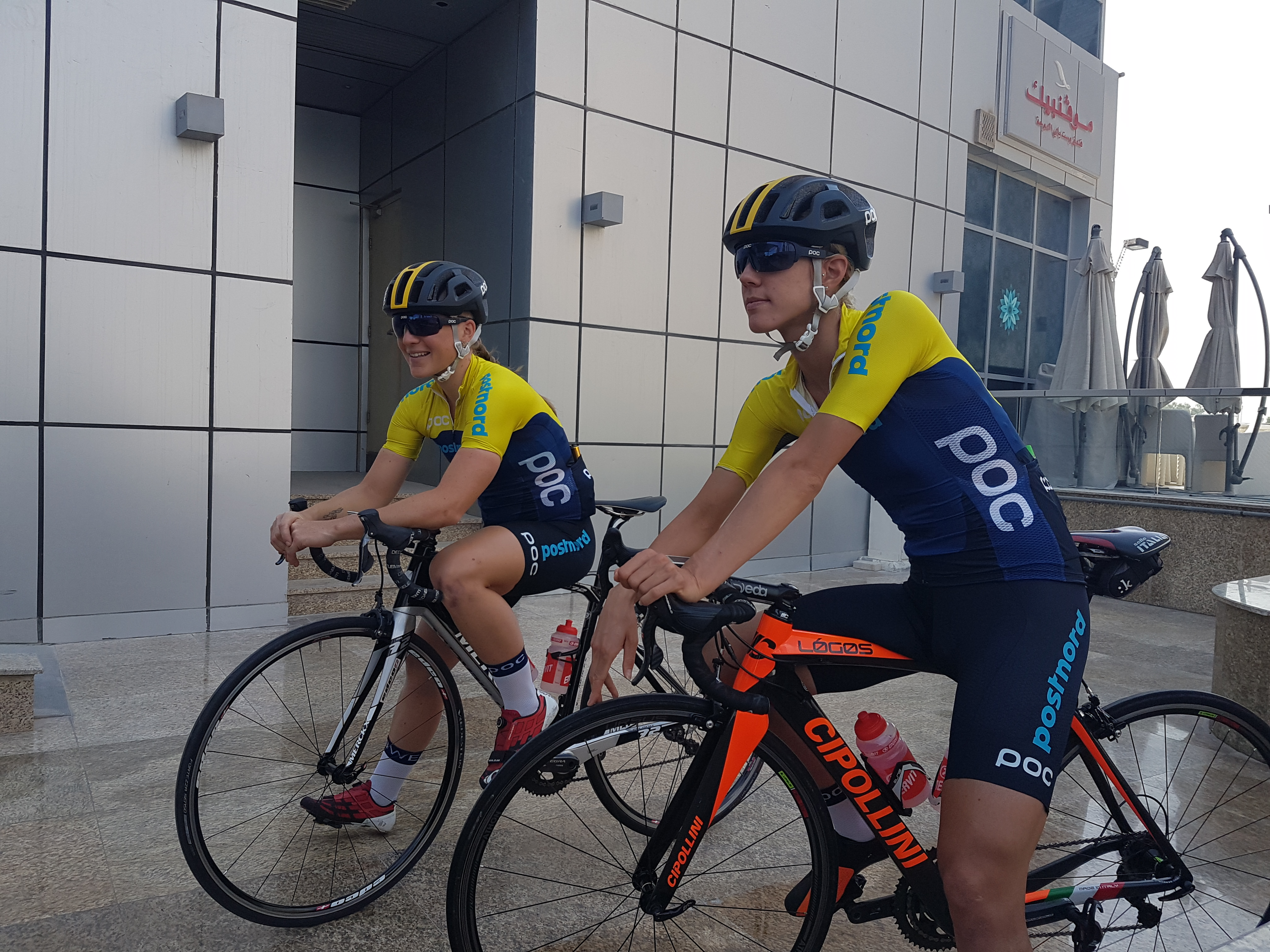 Sara Penton (t.v.) och Emilia Fahlin under landsvägs-VM i Doha, Qatar.